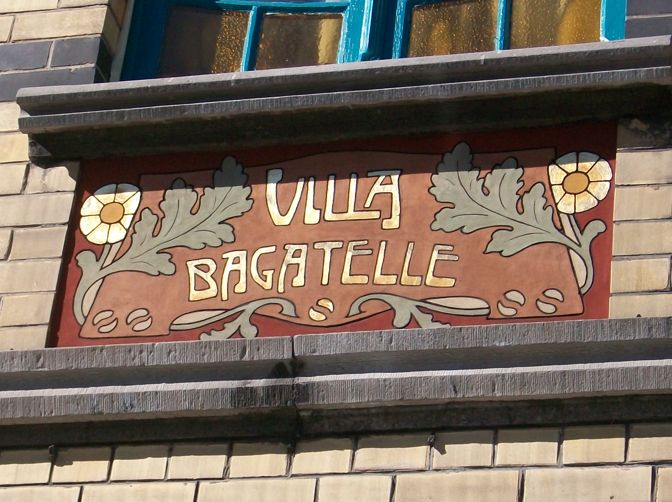 bagatelle